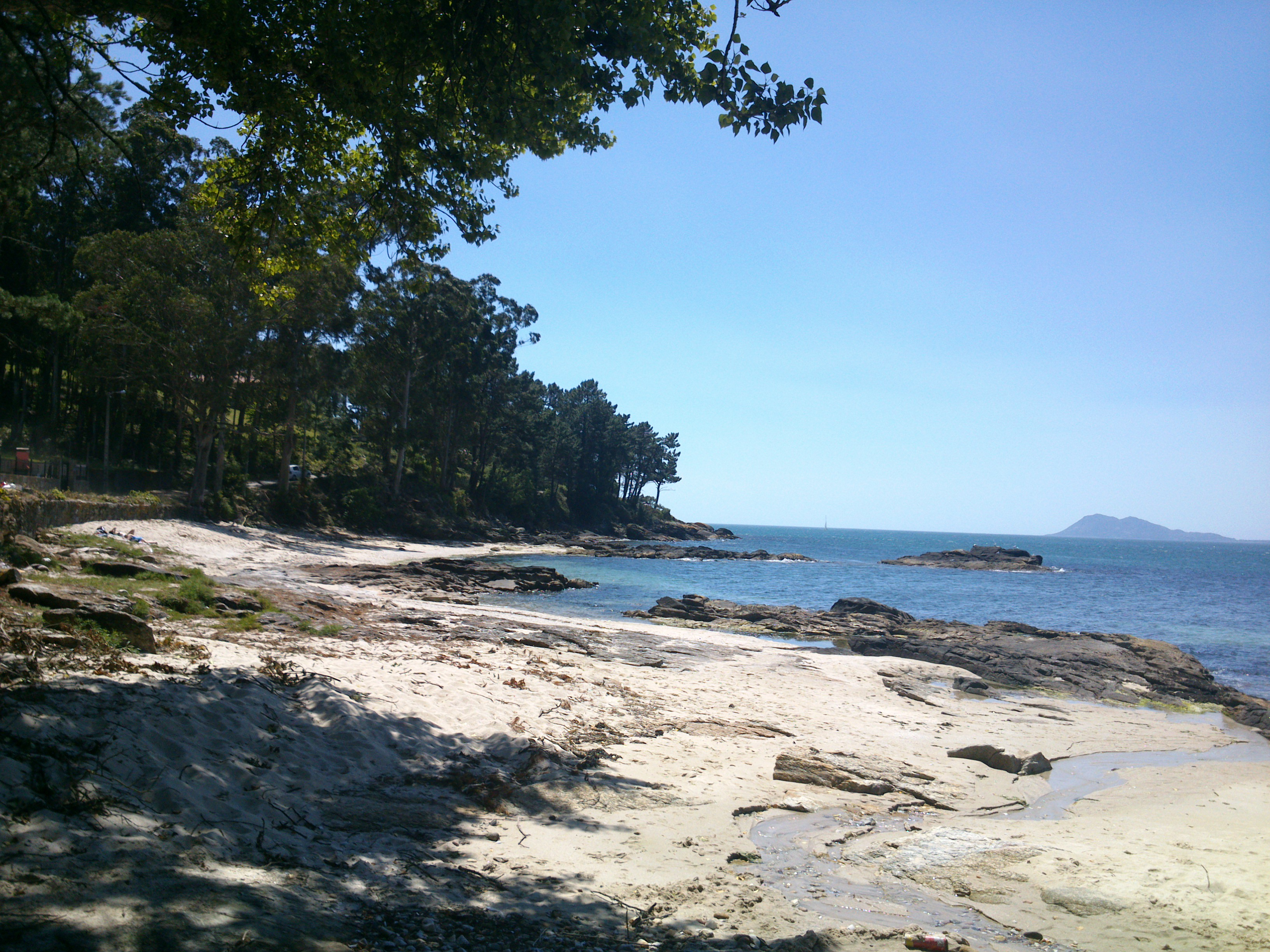 Praia da Telleira, Miñortos, Porto do Son